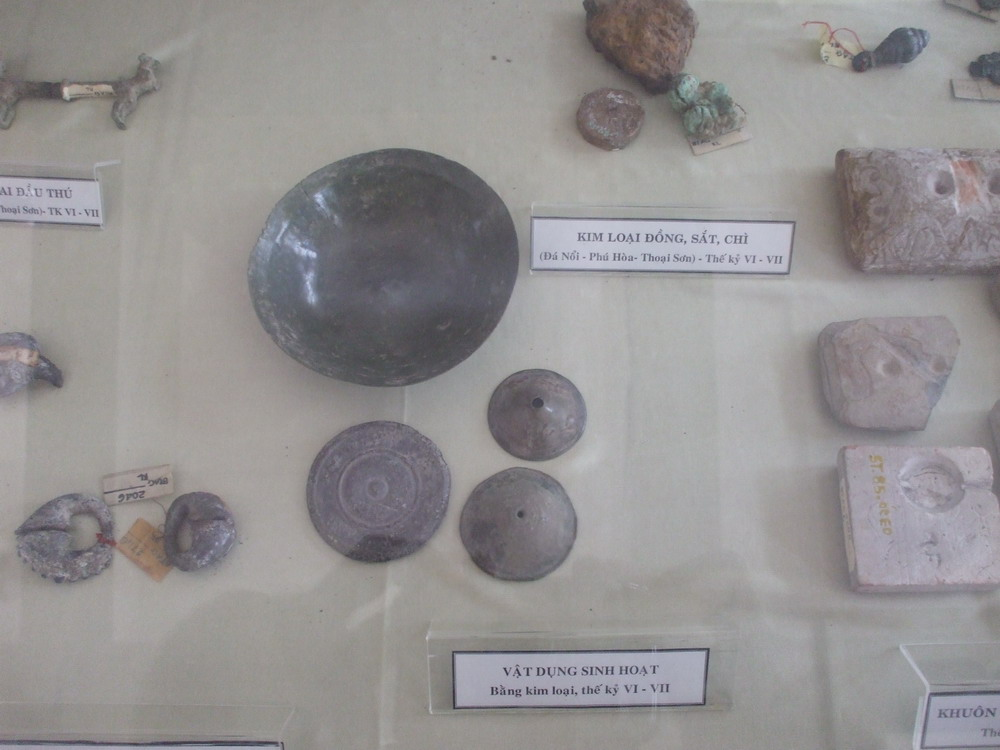 Vật dụng sinh hoạt của Phù Nam, đang được trưng bày tại Bảo tàng An Giang.